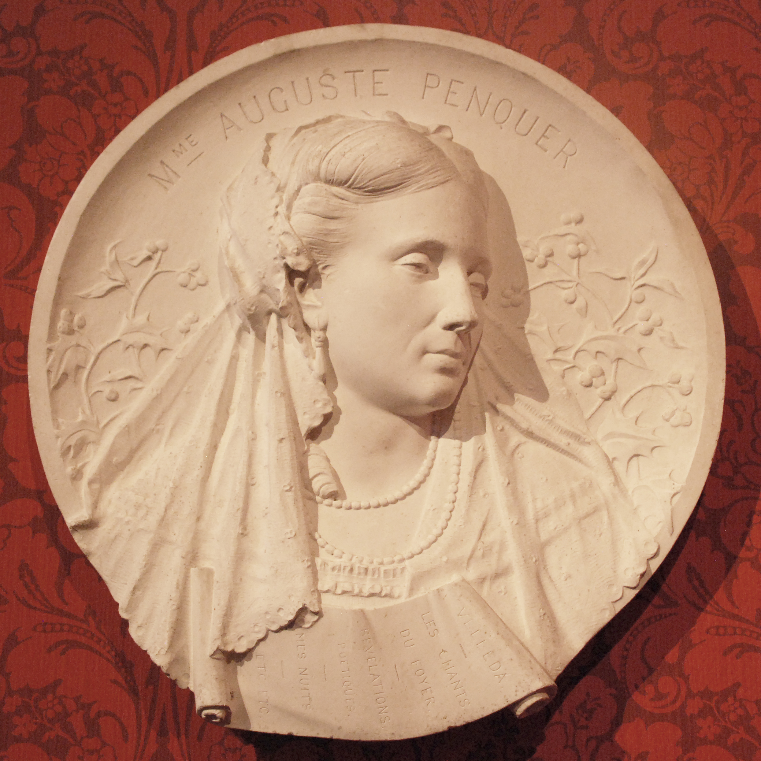 Médaillon de Léocadie Hersent-Penquer par Cyprien Godebski (Méry-sur-Cher, 1835 – Paris, 1909).